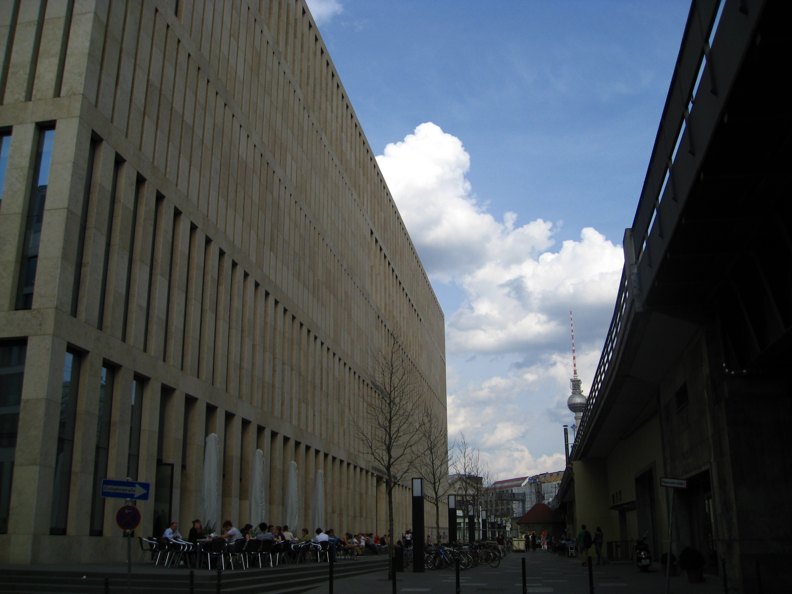 Die vorne Fassade des Grimm-Zentrums.